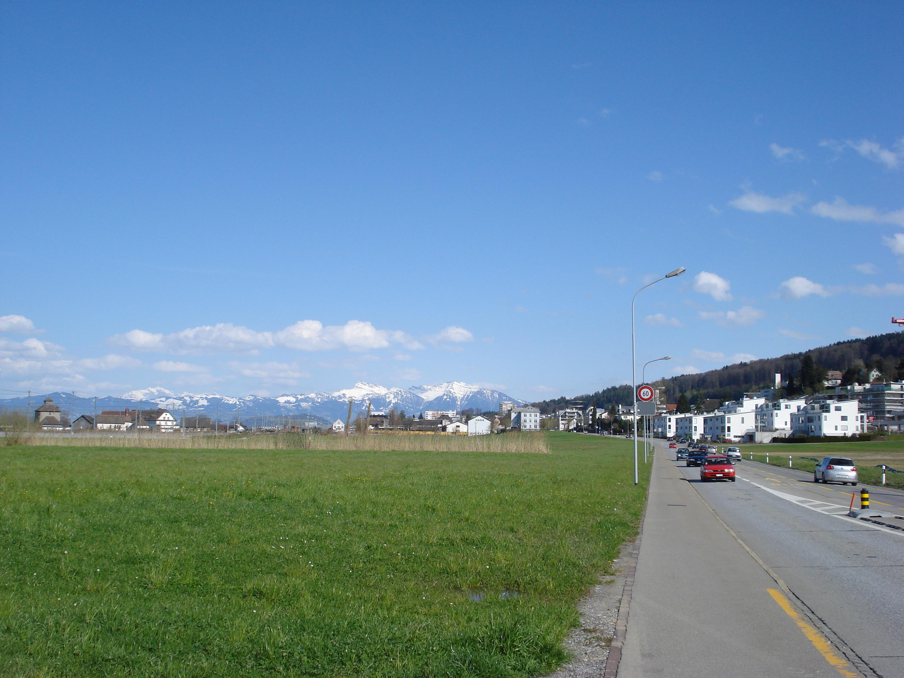 Pfäffikon SZ